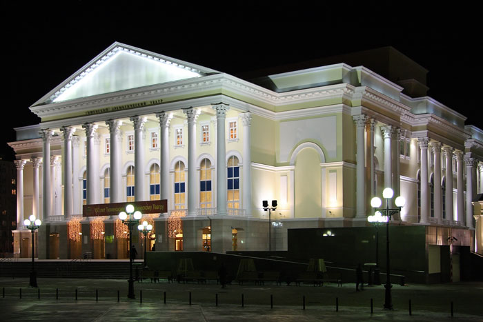 La Tjumena provinca teatro de dramo kaj komedio (Tjumeno, Rusio)